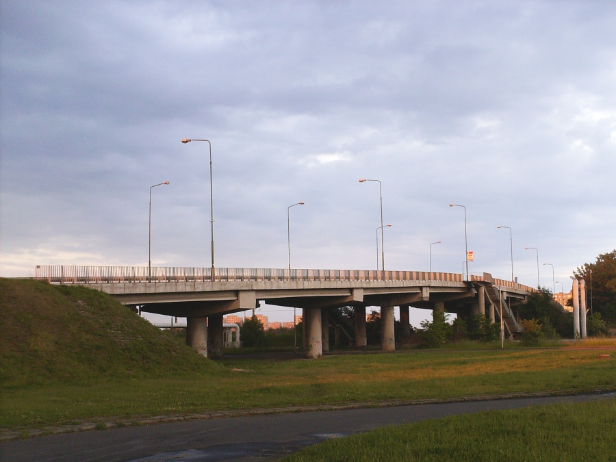 os. Kopernika w Legnicy